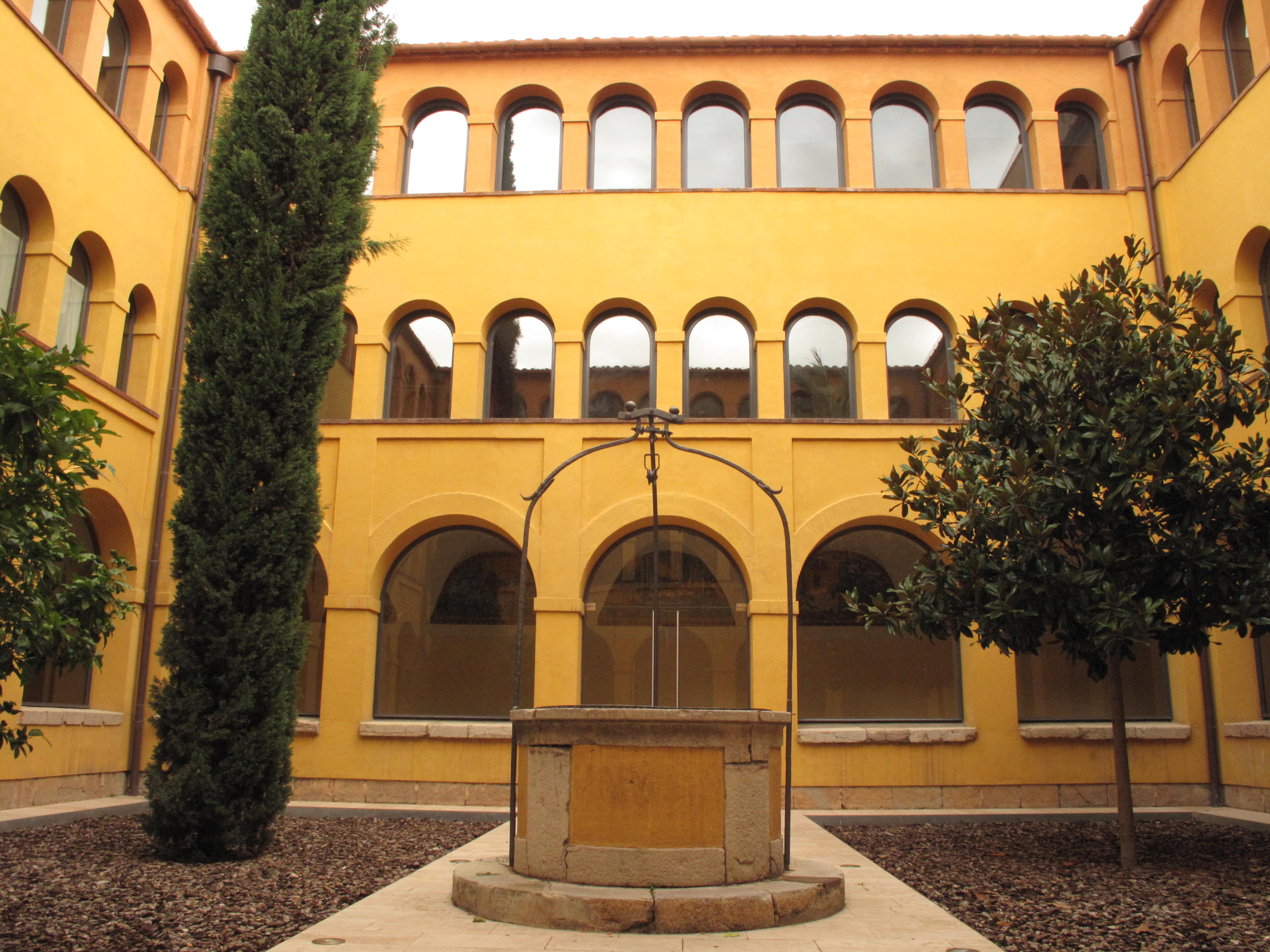 Hospital de Sant Llàtzer, claustre de Sant Francesc (Terrassa)